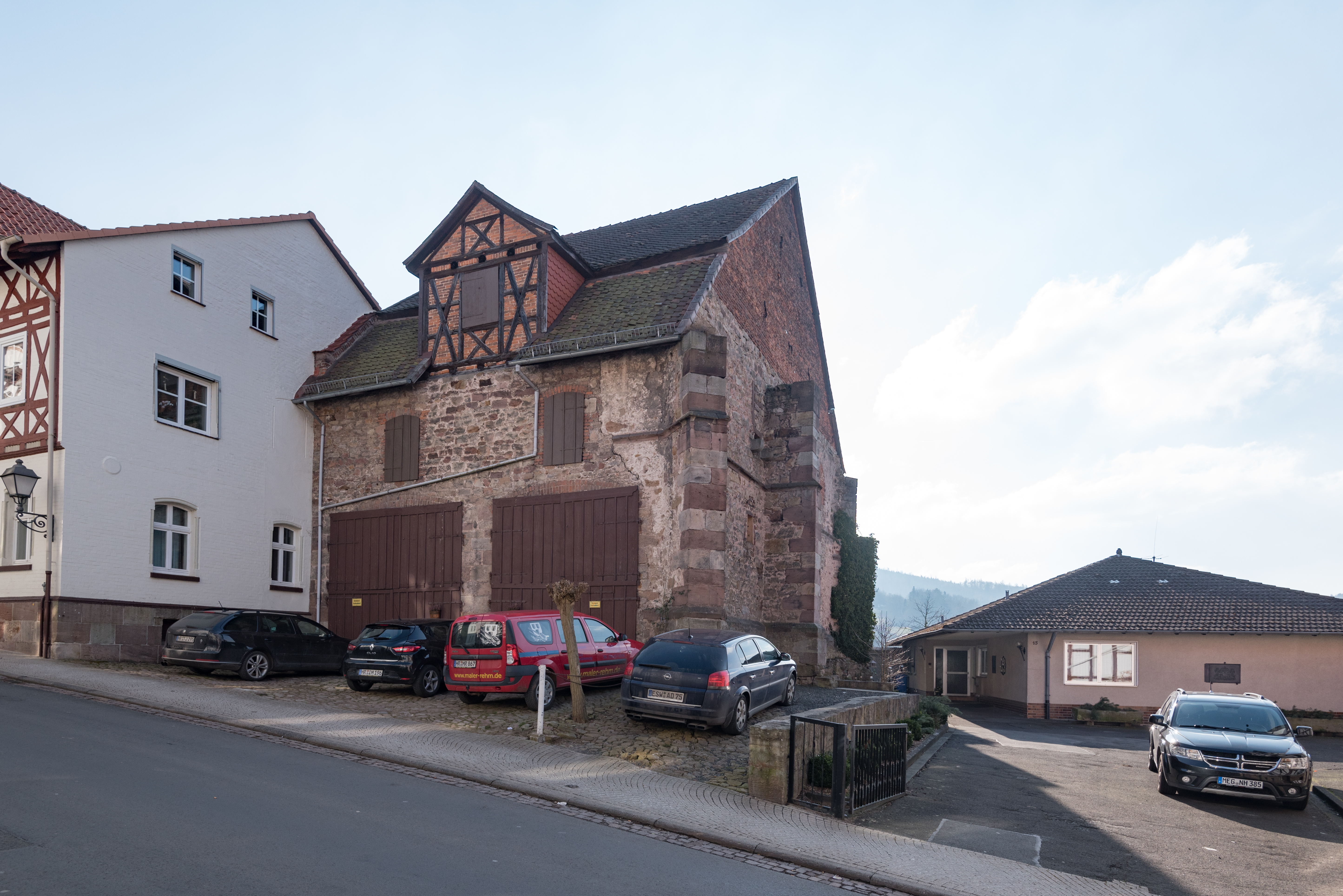 Spangenberg, Klosterstraße 13, Scheune, einst Teil des Karmeliterklosters